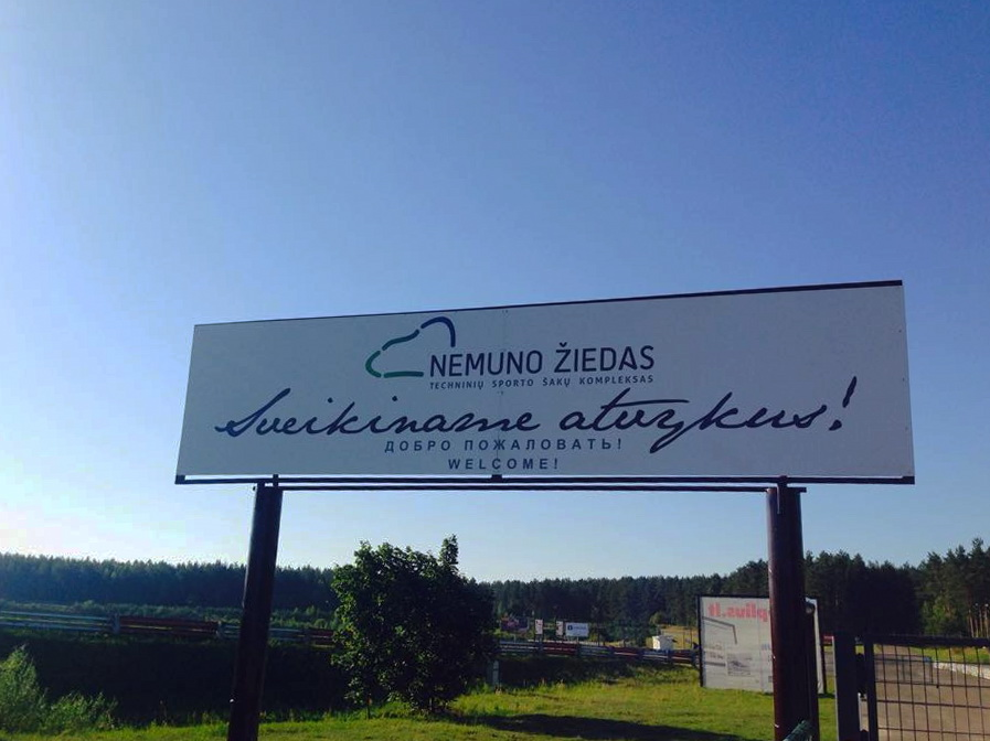 Nemuno žiedo atsinaujinęs įvažiavimas "Sveikiname atvykus!"